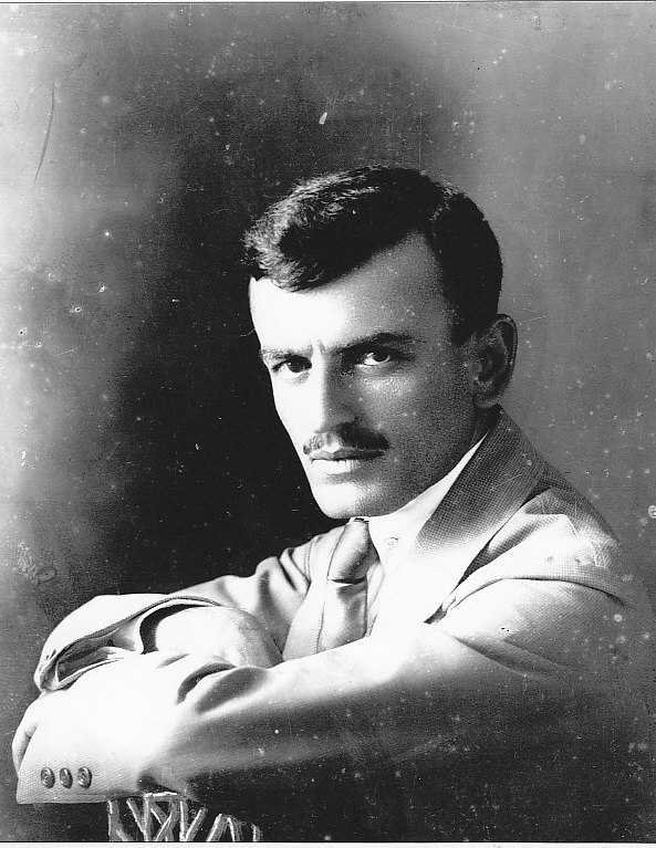 Prywatne Archiwum